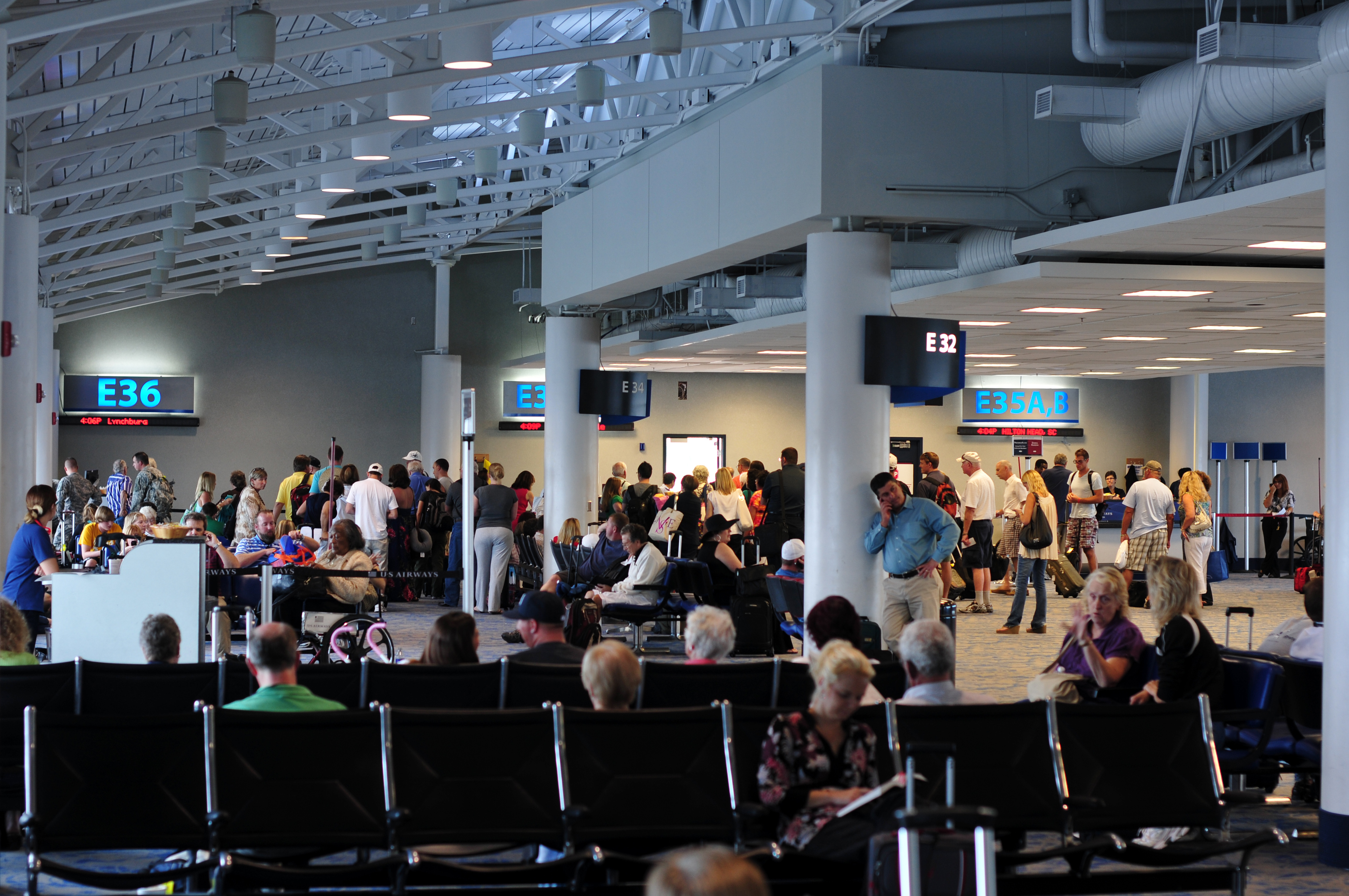 Impressionen Wikimania Washington D.C. 2012 The making of this work was supported by Wikimedia Austria. For other files made with the support of Wikimedia Austria, please see the category Supported by Wikimedia Österreich.